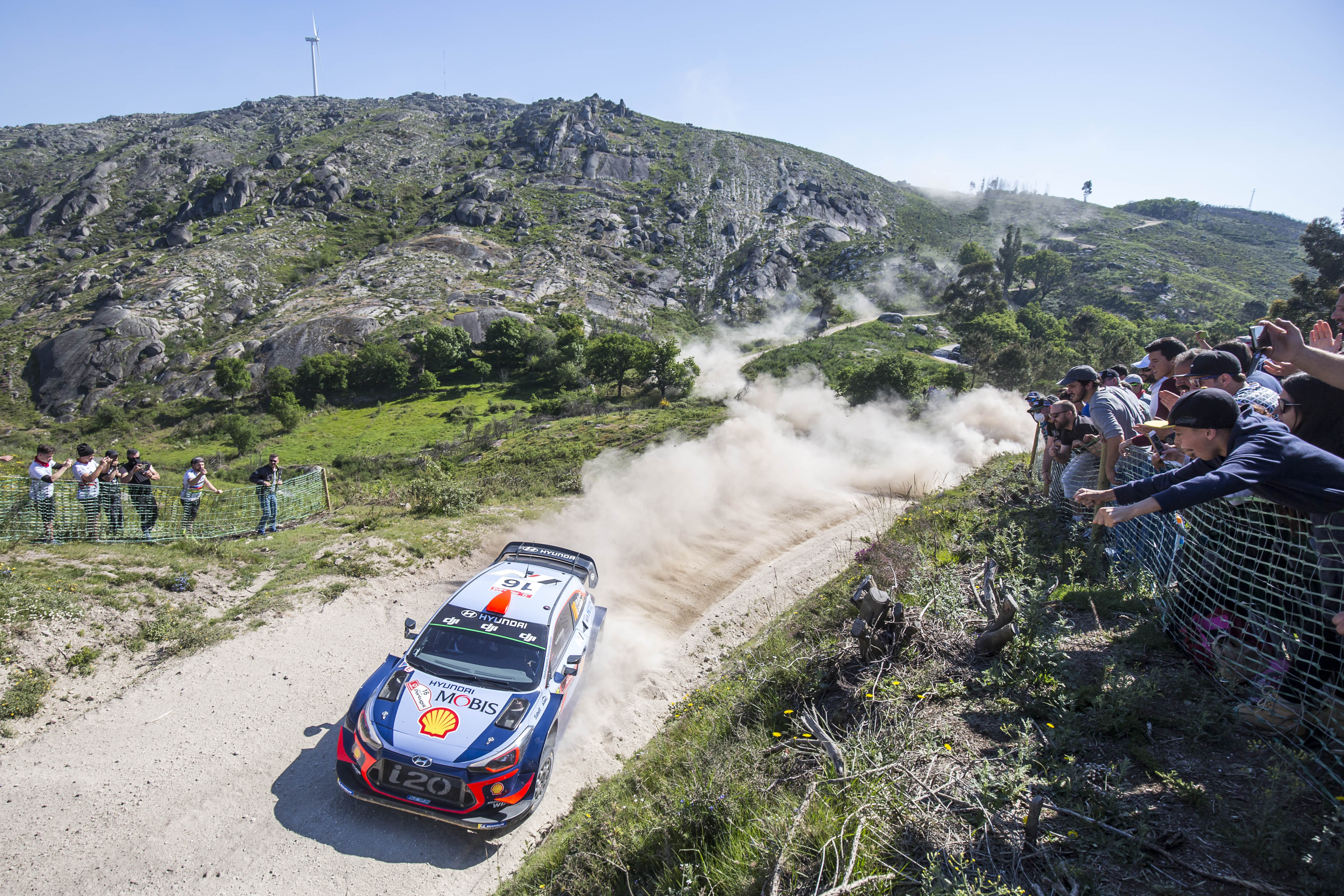 Dani Sordo podczas Rajdu Portugalii 2018